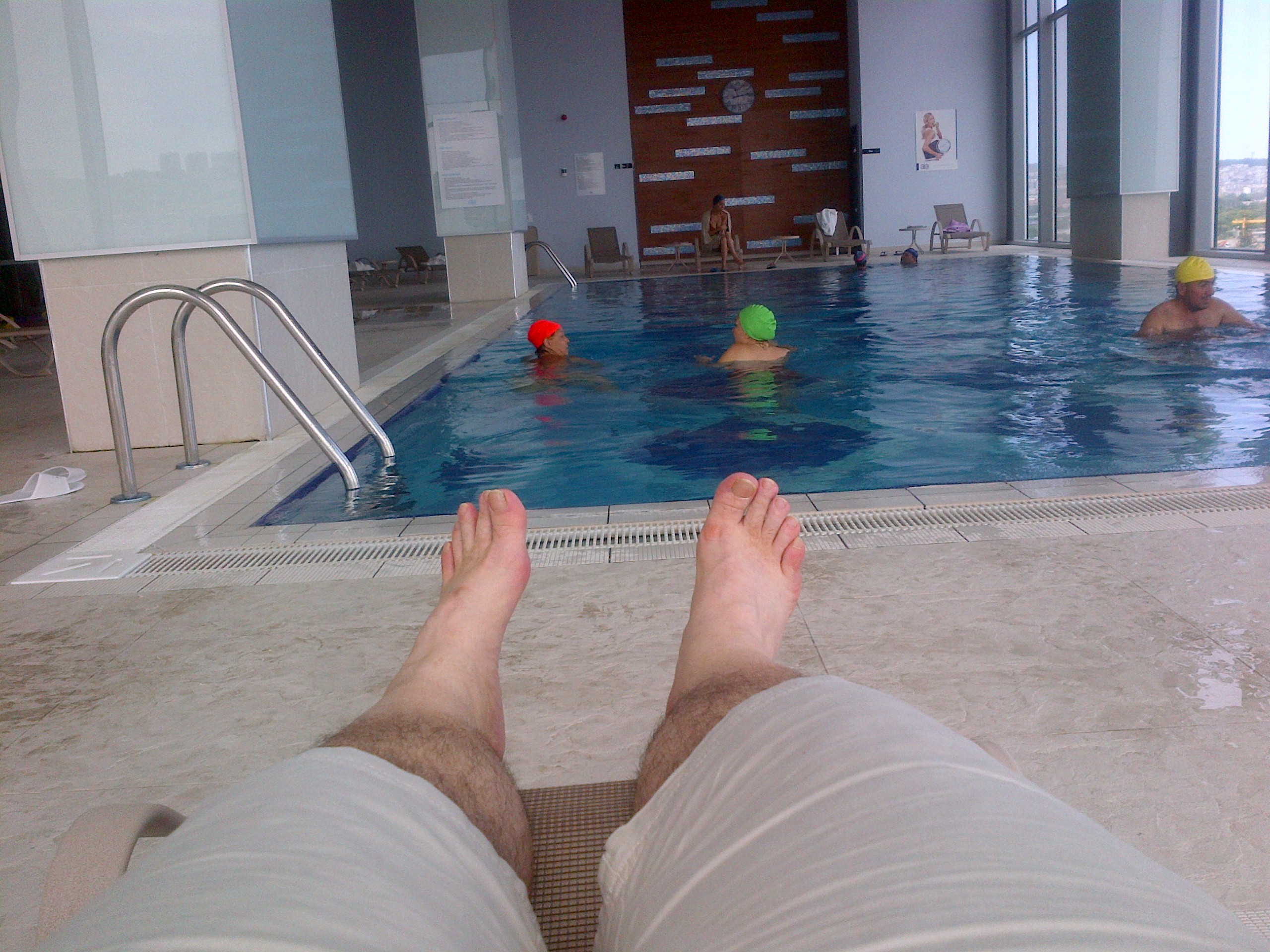 Selfie.